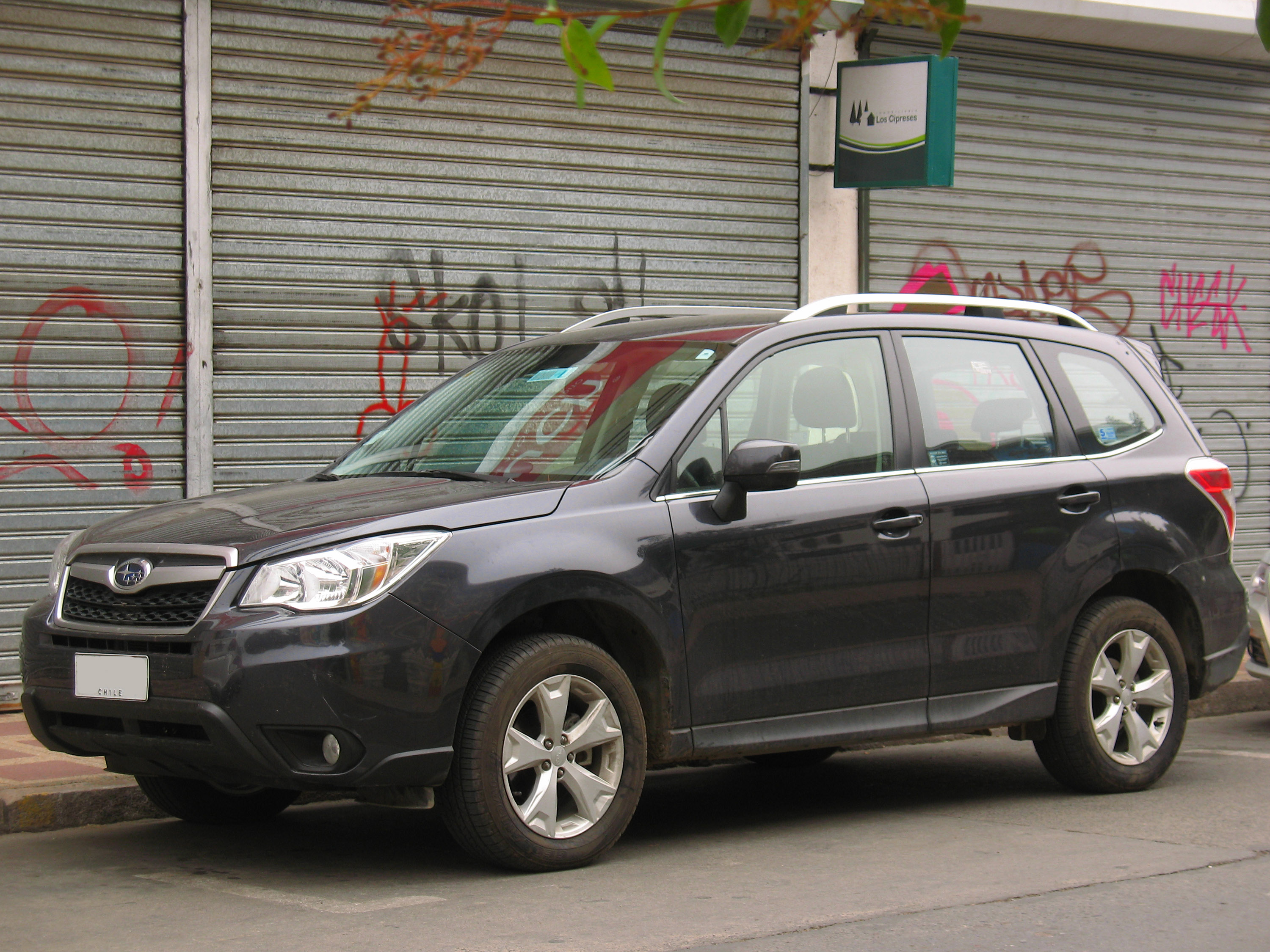 Subaru Forester 2.0 XS 2013